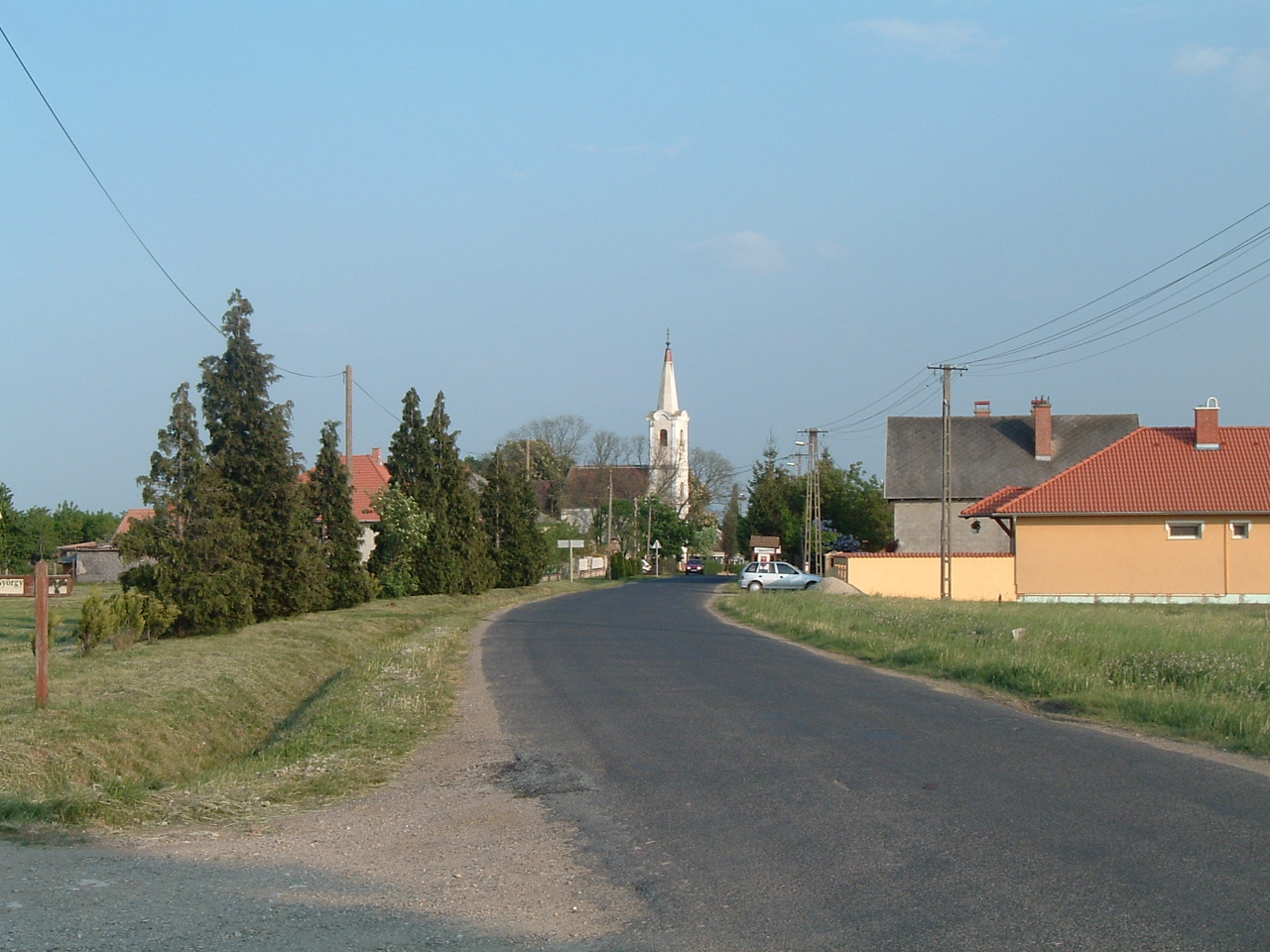 Vasszilvágy, Hungary